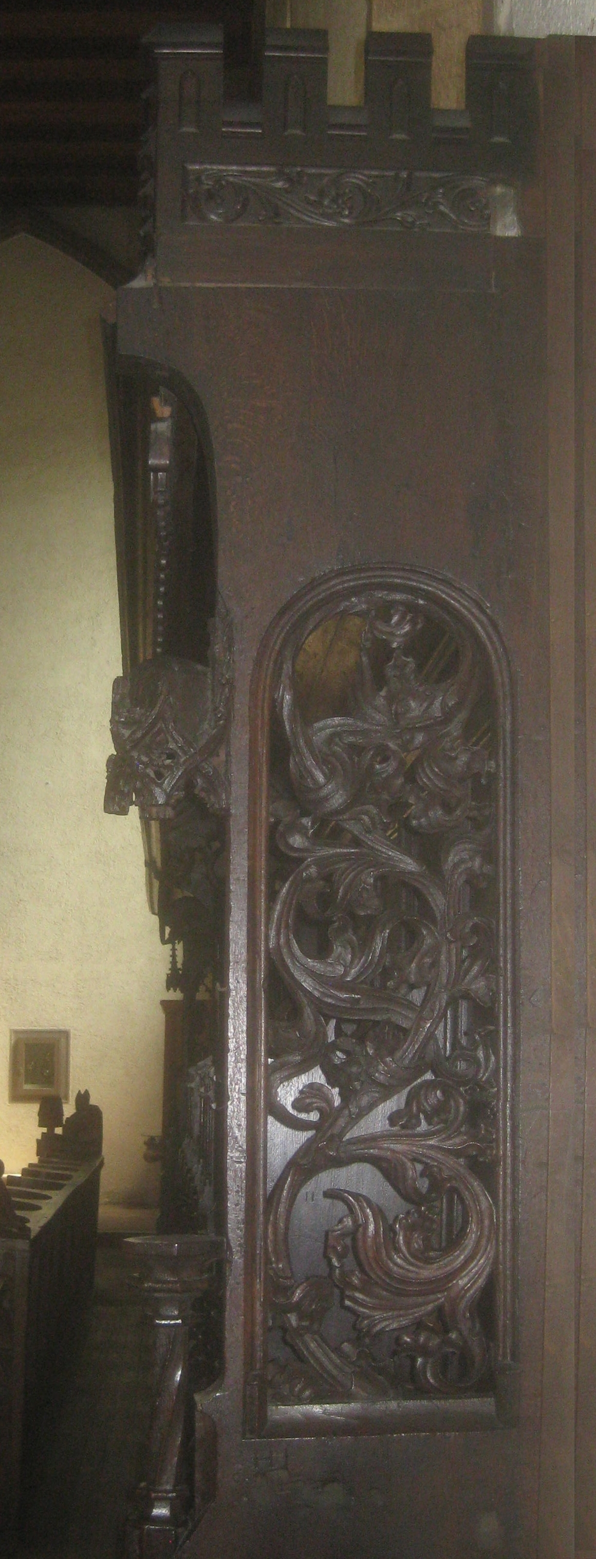 Chorgestühl der Leonhardskirche, Südostfassade, hintere Sitzreihe, Obergeschoss der rechten Abschlusswange mit durchbrochenem Rankenwerk.